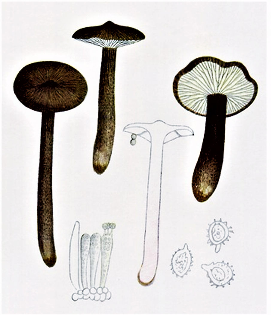 Bres.: Lactarius lignyotus f. gracilis (Fr.) Bres., 1928 = Lactarius lignyotus Fr. (1855)